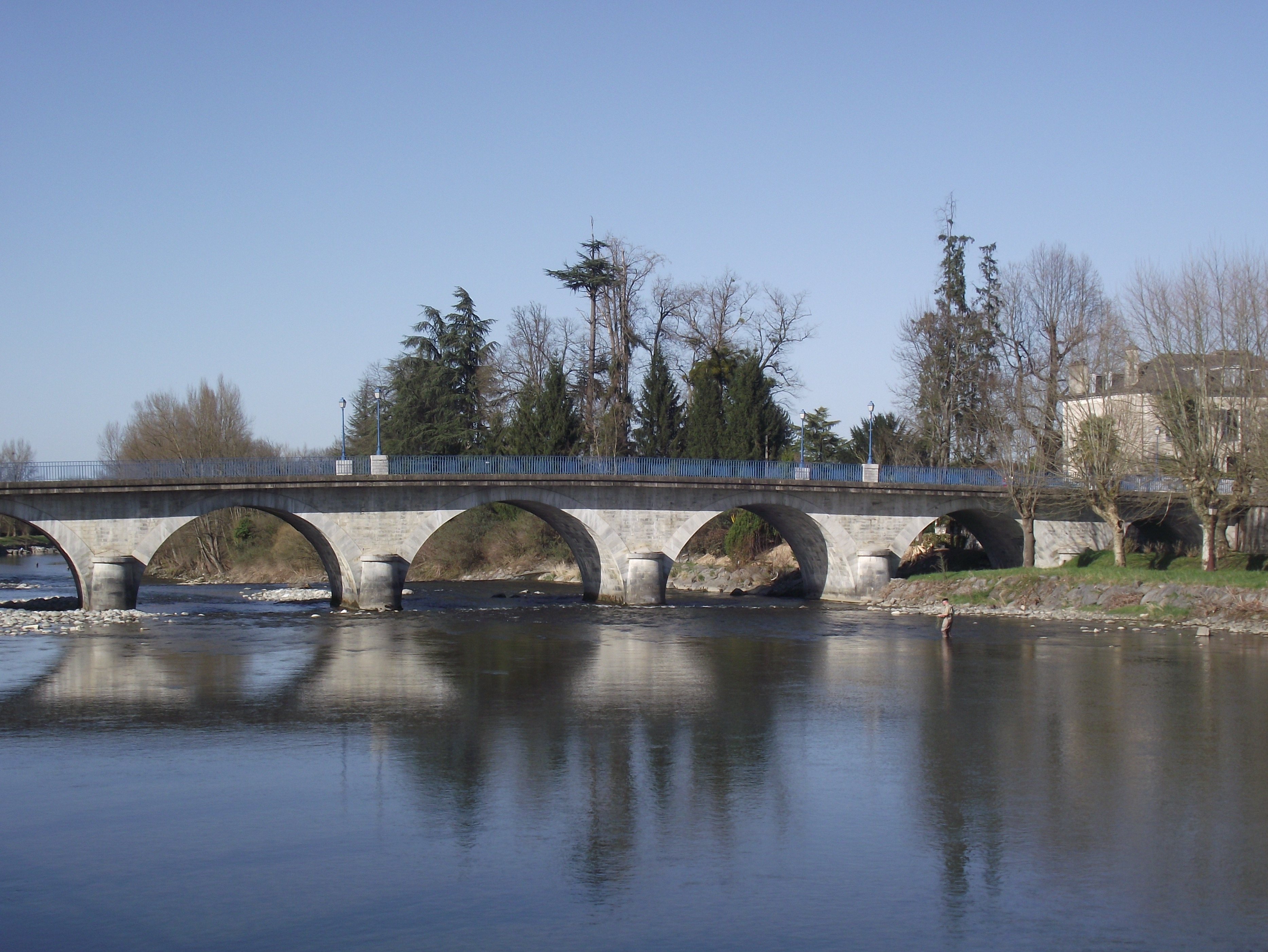 Pont de Nay (Pyrénées-Atlantiques, France